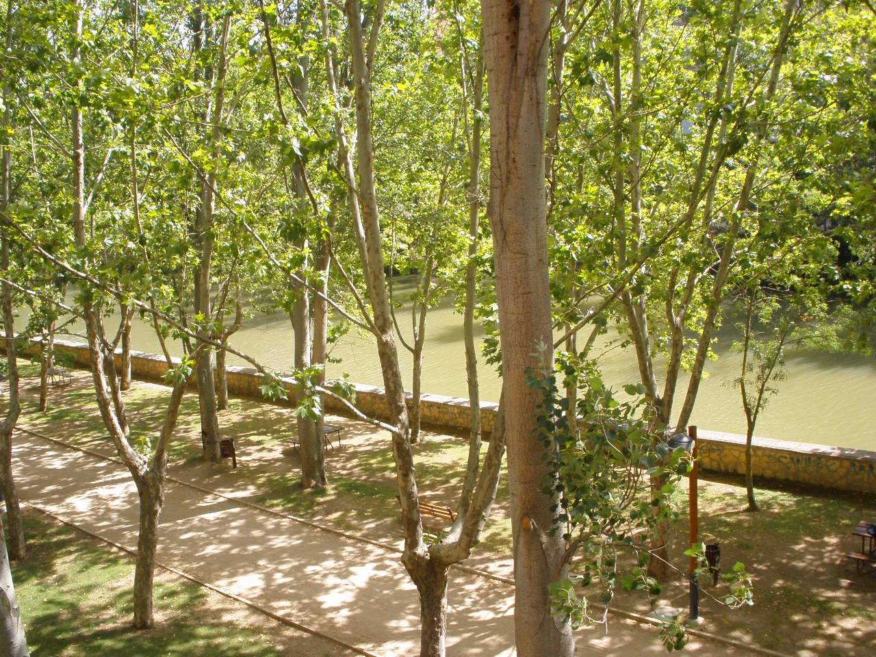 Río Duero, a su paso por Aranda de Duero (Burgos)